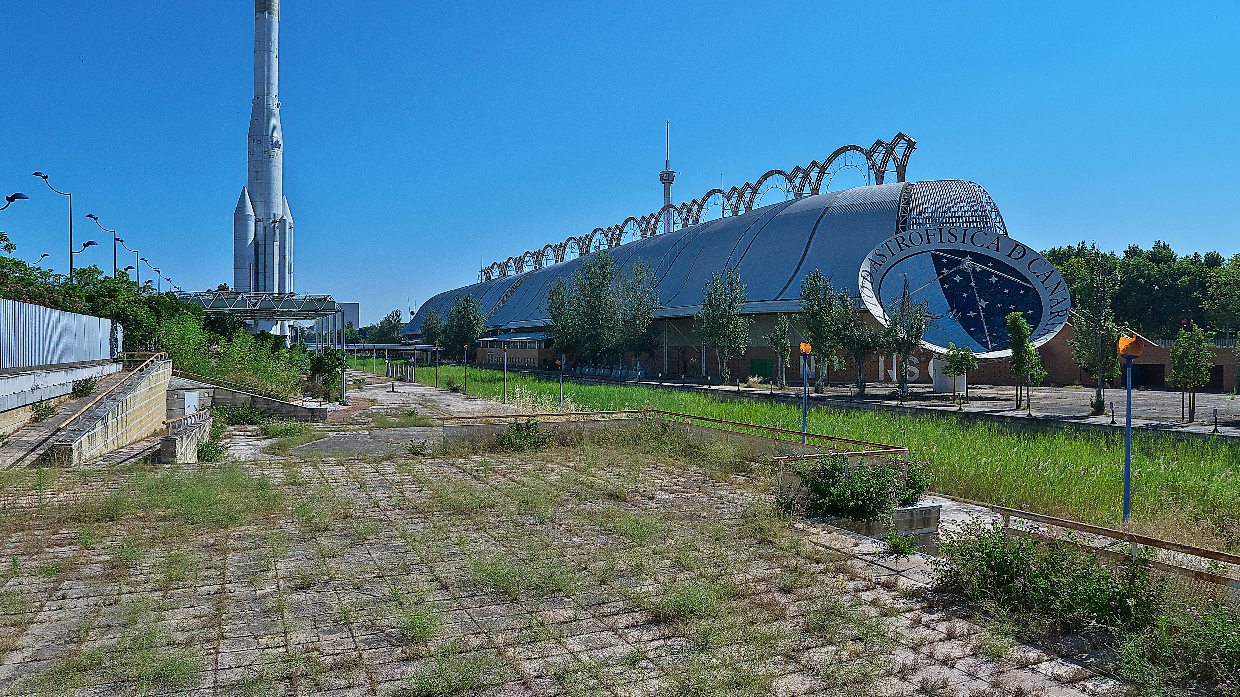 Exposición Universal de Sevilla de 1992. Entre los mayores de la Exposición Universal (25.000m2) diseñado por Peter Rice y Oriol Bohigas Guardiola